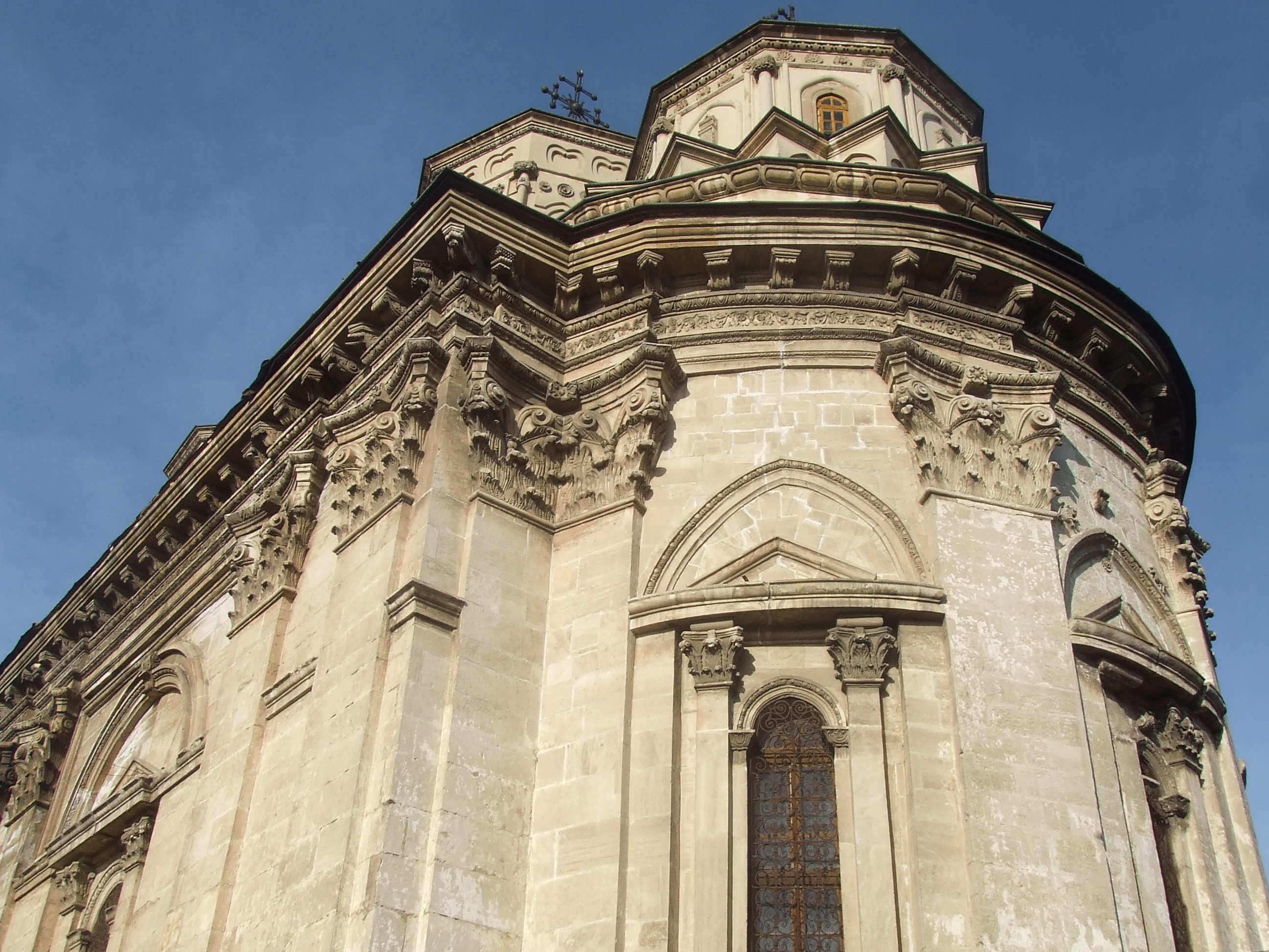 Mănăstirea Golia